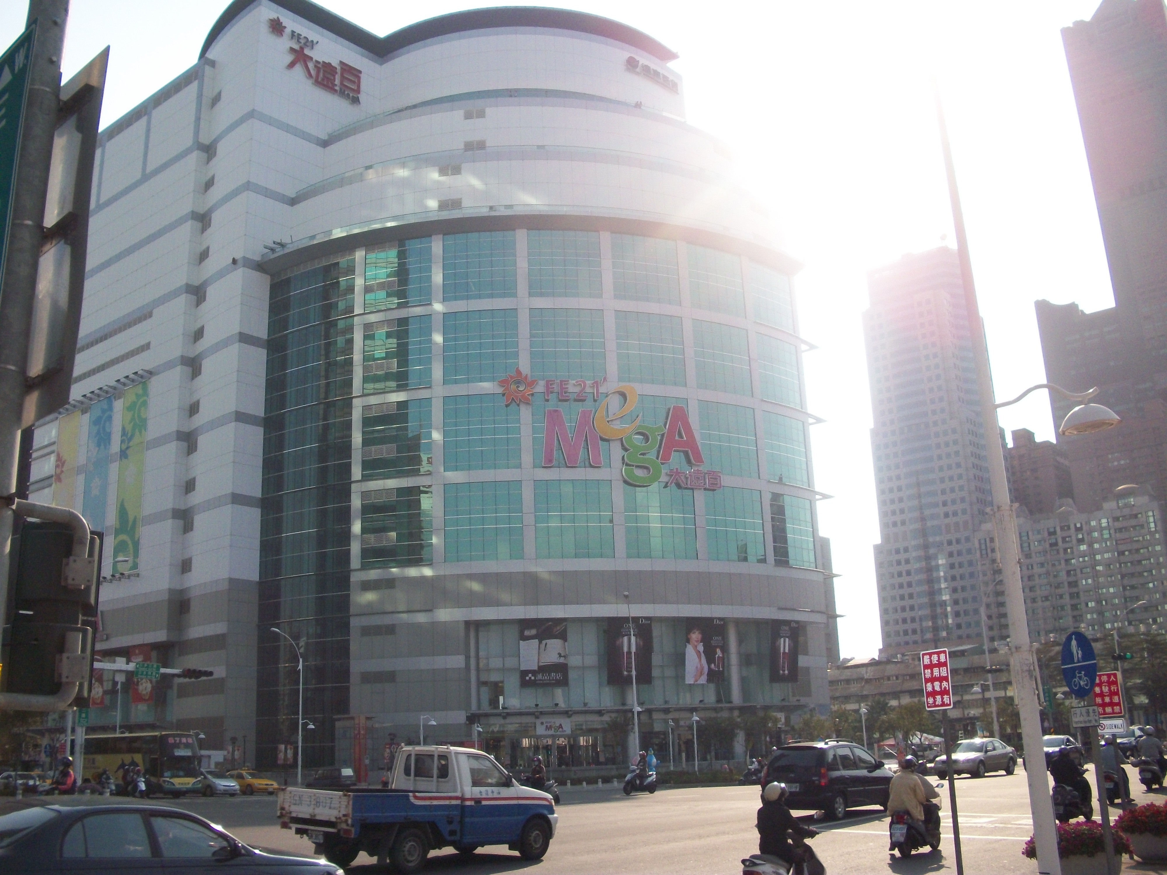 中文（台灣）: 大遠百高雄店